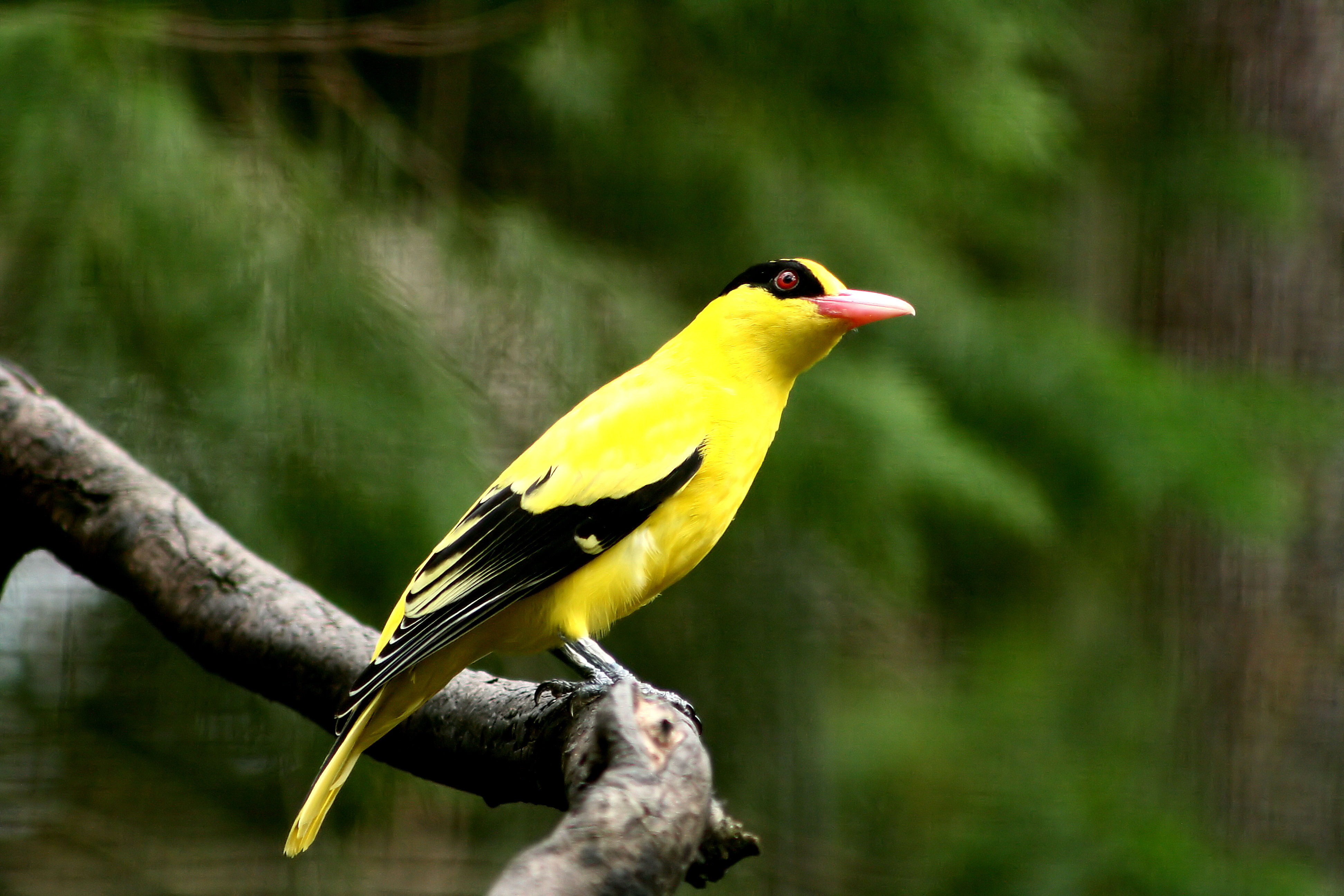 Bird